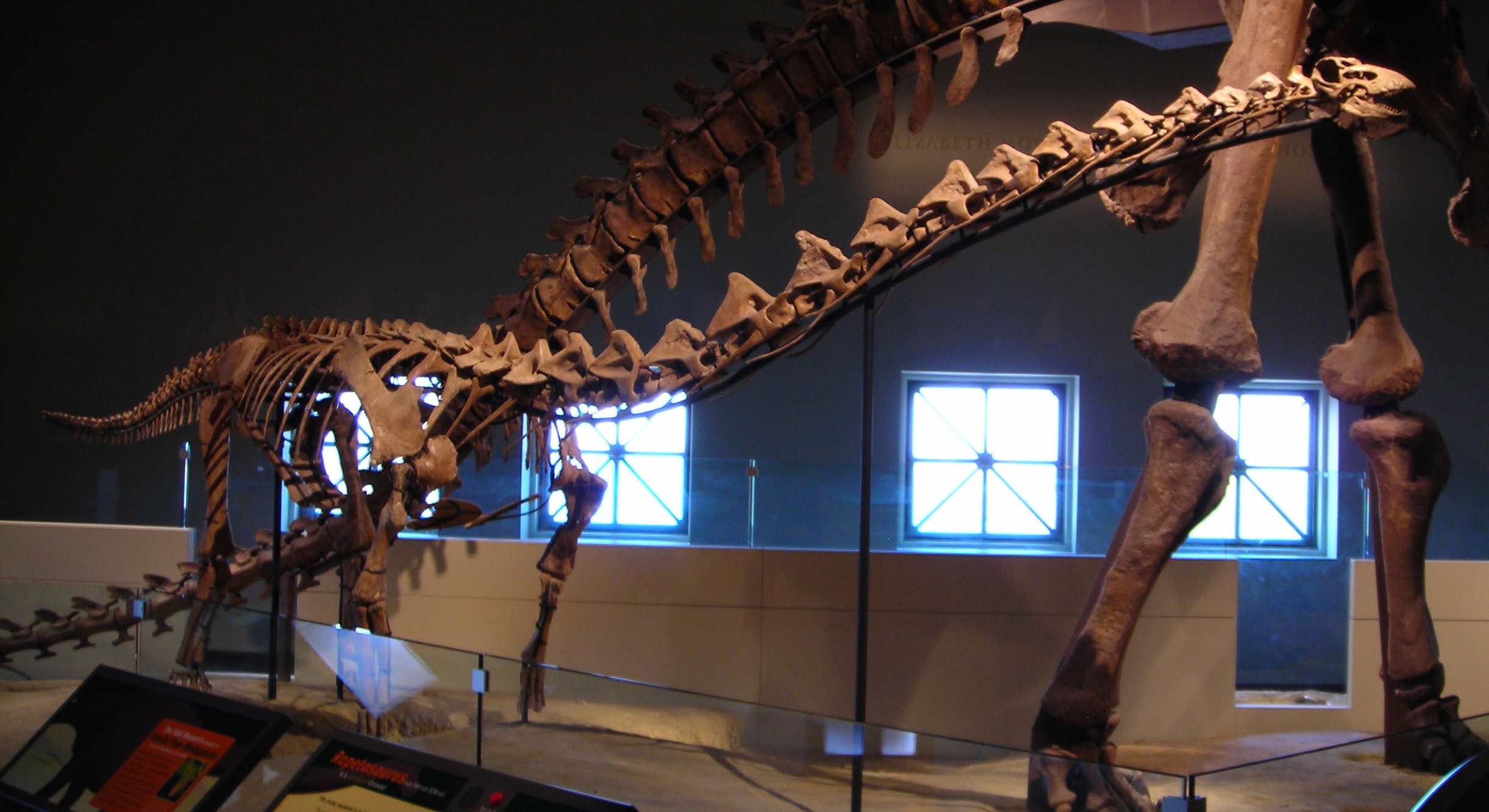 Rapetosaurus skeleton, Chicago.